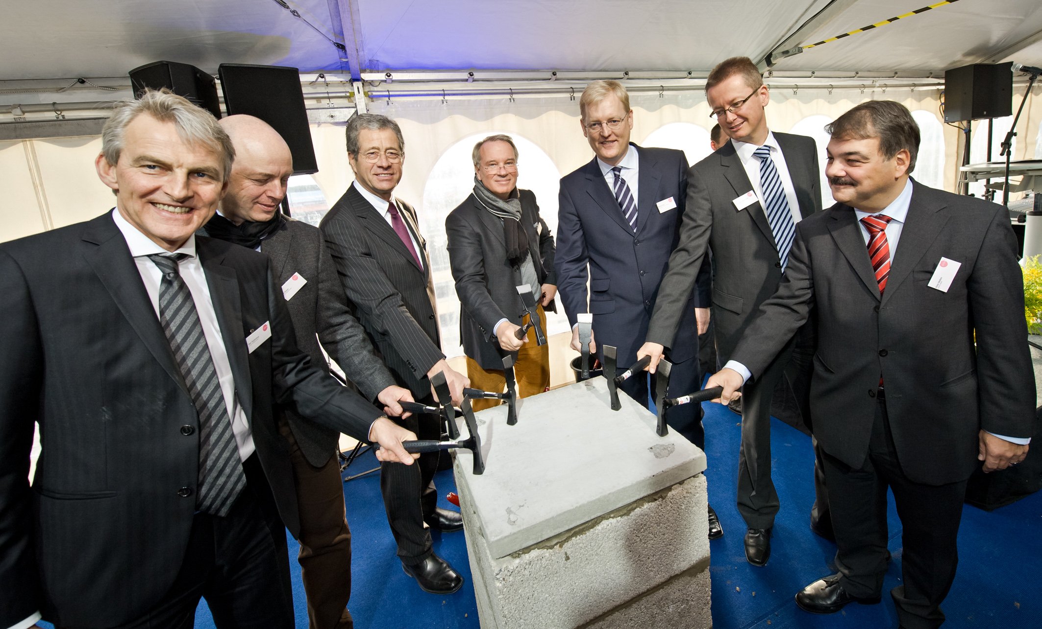 Grundsteinlegung in Gateway Gardens, v.l.n.r.: Ralf Teckentrup, Vorsitzender der Geschäftsführung Condor Flugdienst GmbH; Uwe Balser, Geschäftsführer Condor Flugdienst GmbH; Dr. Alois Rhiel, Vorsitzender der Geschäftsführung OFB Projektentwicklung GmbH; Matthias Neumann, Architekt Neumann & Partner; Markus Frank, Stadtrat der Stadt Frankfurt am Main; Dr. Ulrich Johannwille, Geschäftsführer Condor Flugdienst GmbH; Peter Matteo, Geschäftsführer Groß & Partner Grundstücksentwicklungsgesellschaft mbH - Frankfurt 13.12.2010 (c) Uwe Noelke MENSCHENfotografie